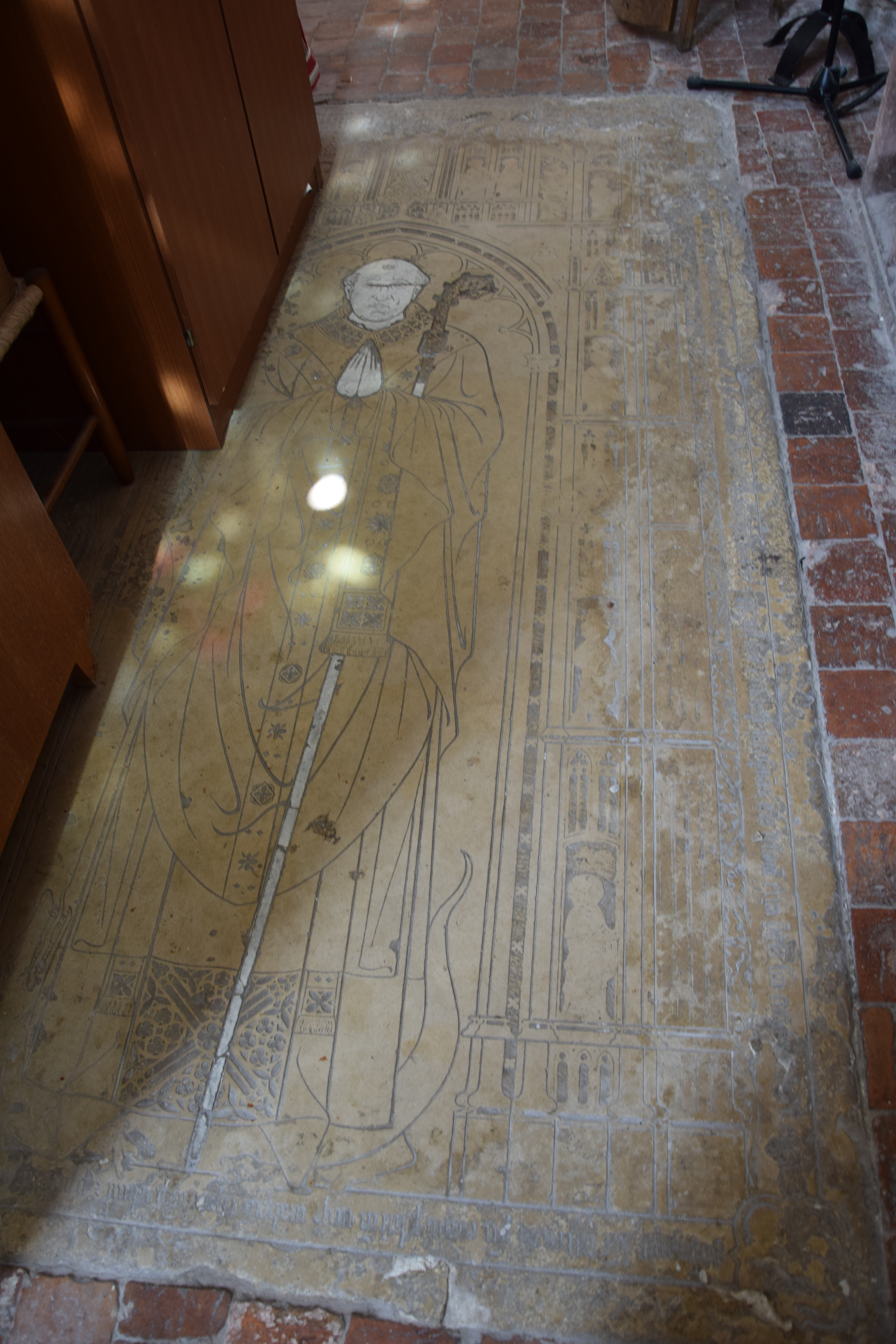 Sainte-chapelle de Saint-Germer-de-Fly, dalle funéraire à effigie gravée de l'abbé Jean de Silly, 1390.